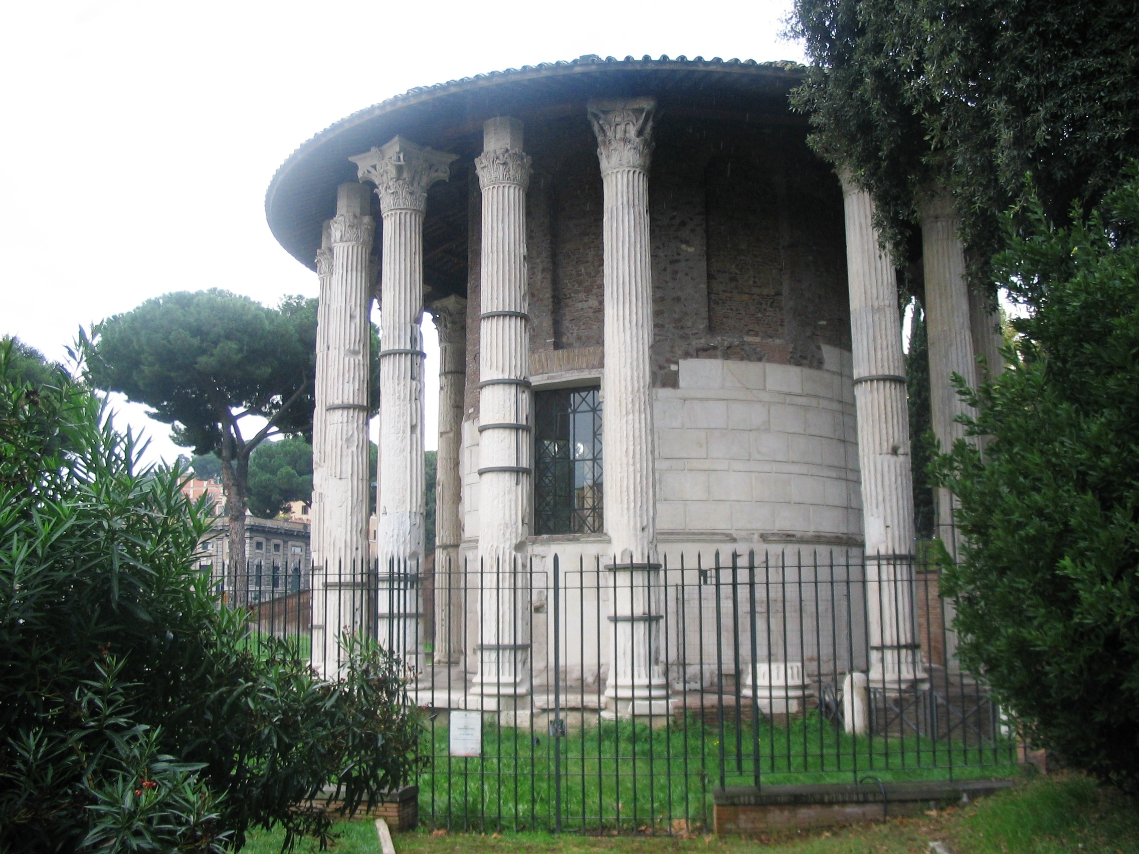 Temple d'Hercule Olivarius vu depuis le nord-est. On peut y voir l'emplacement de la colonne manquante.